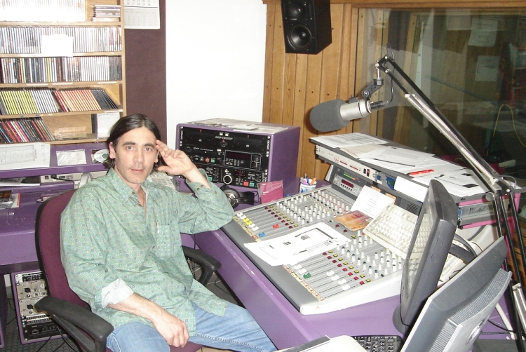 Vinko Pejić, Slavonski radio. Svibanj, 2005.